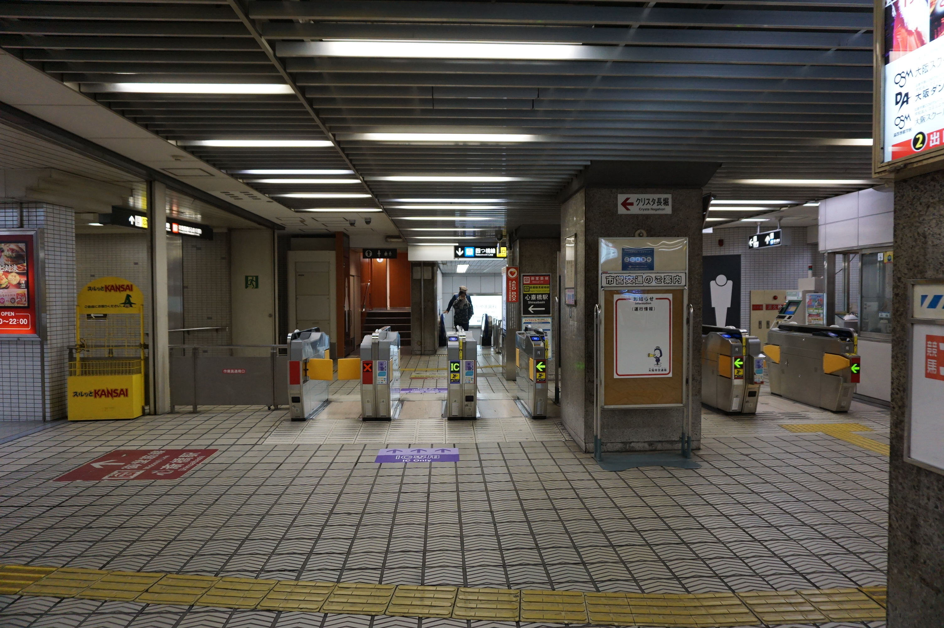 四ツ橋駅の北改札口 Sony ILCE-6000